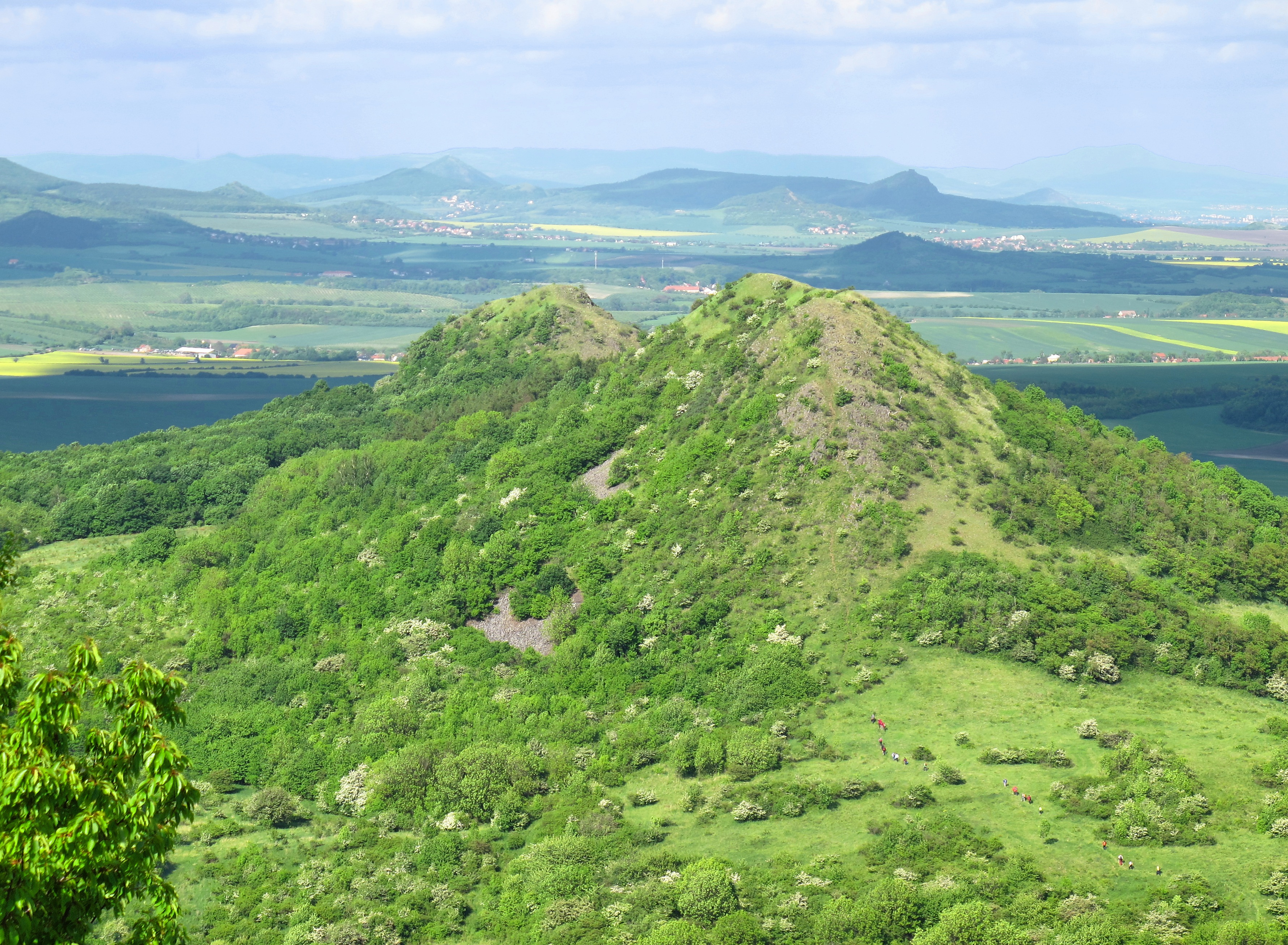 Srdov (482 m) a Brník (471 m) v Českém středohoří z Oblíku (509 m)